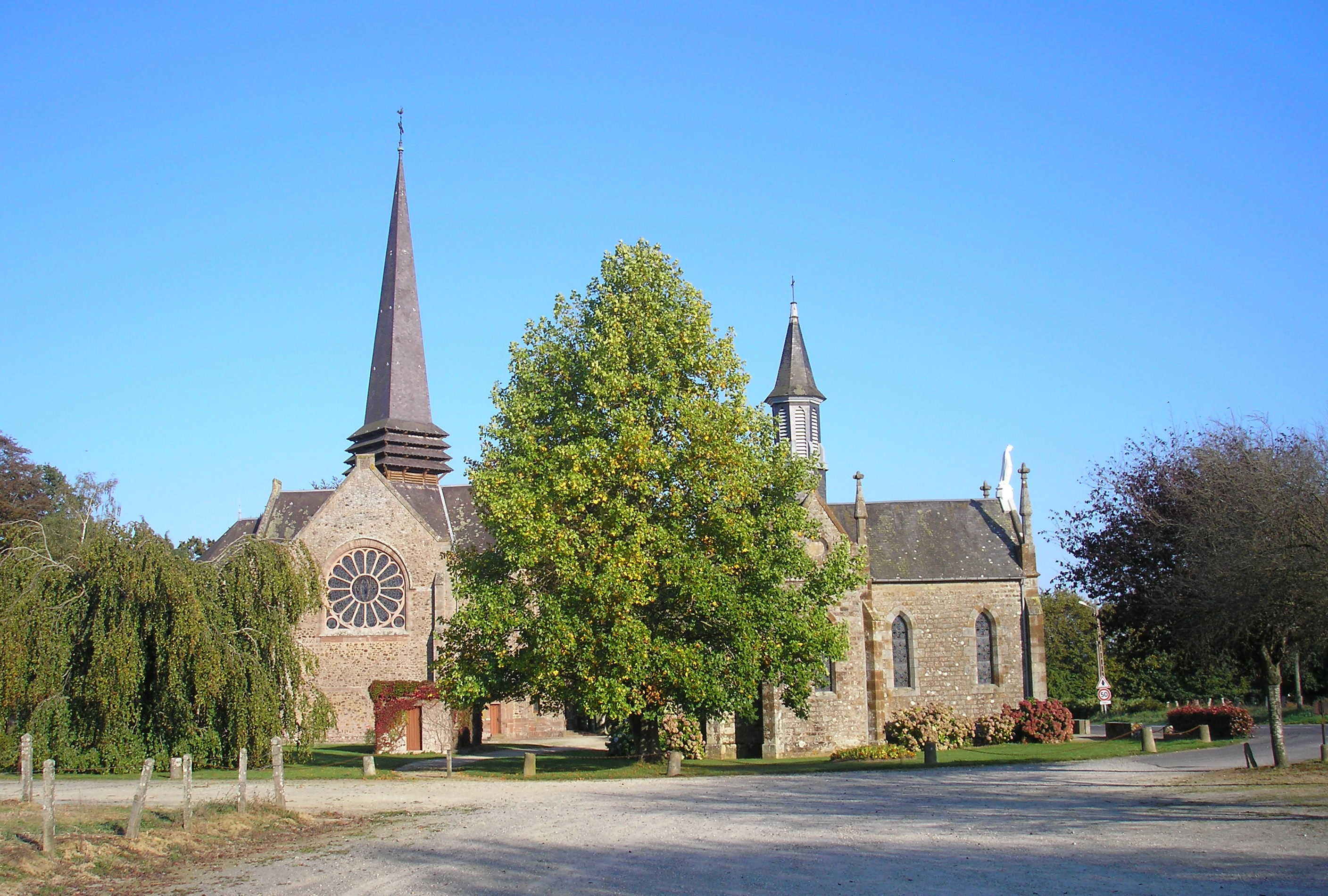 Passais (Normandie, France). Les deux chapelles Notre-Dame-de-l'Oratoire.